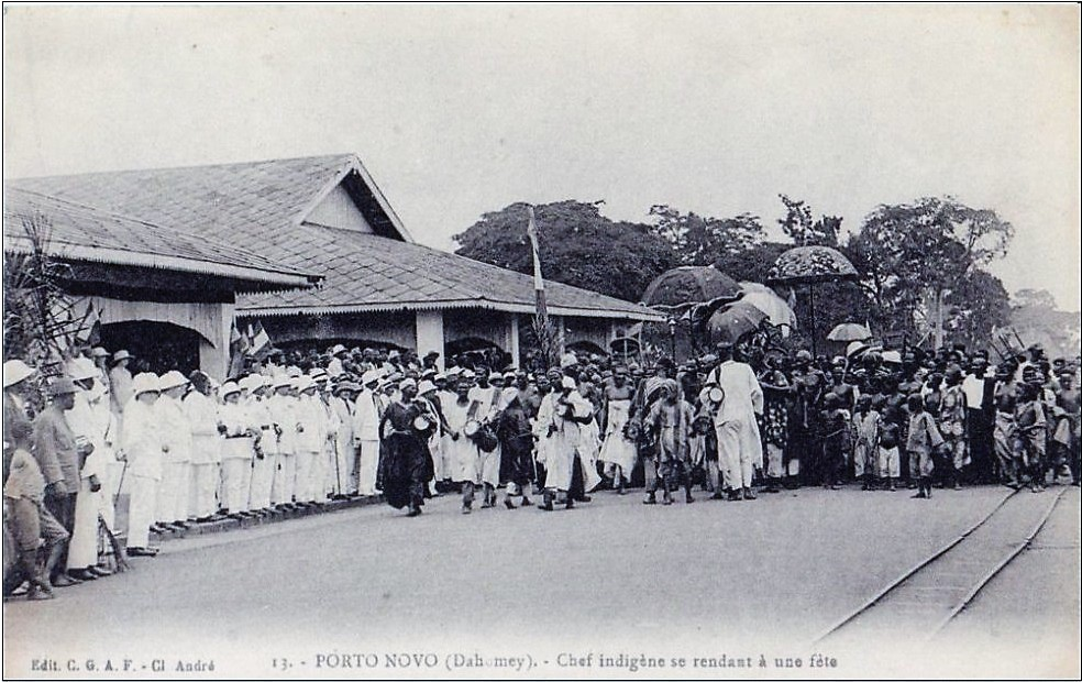 Carte postale - 13. - Porto Novo (Dahomey) - Chef indigène se rendant à une fête